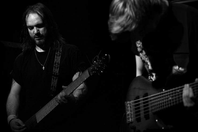 Obscure Sphinx podczas występu na żywo w Gdyni.